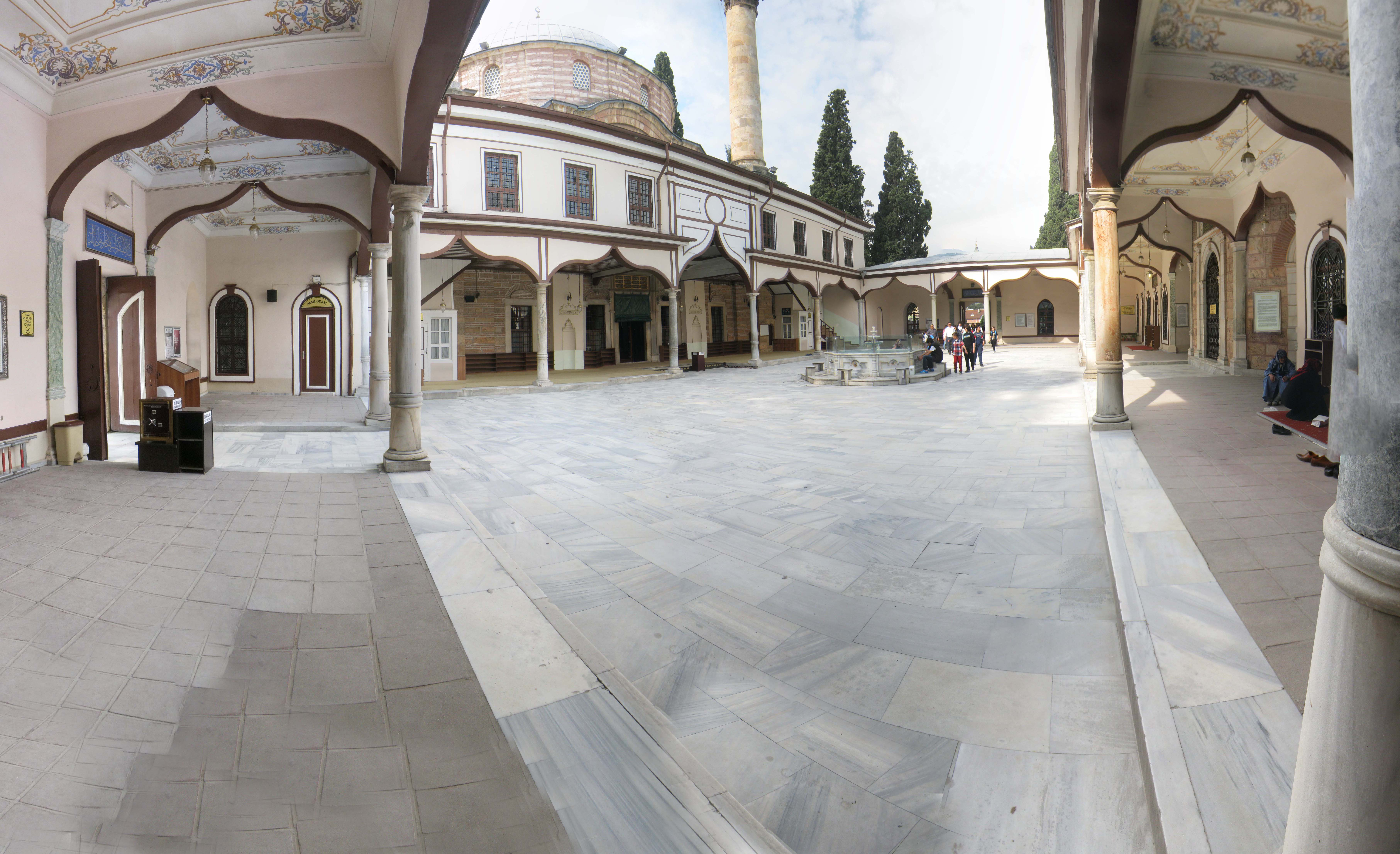 EMİRSULTAN CAMİİ İÇ AVLUSU BURSA